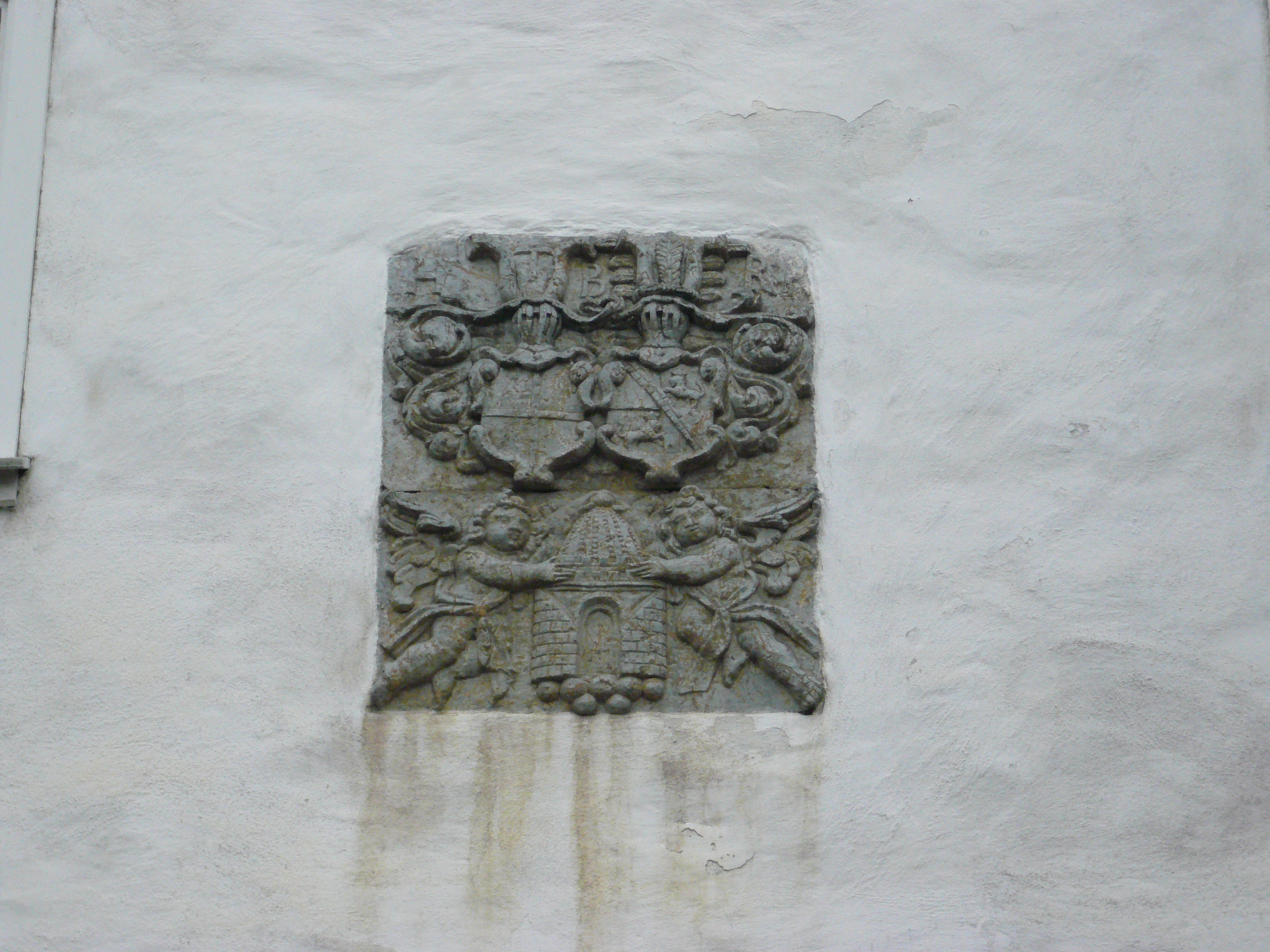 Stadsporten, klebersteinsdetaljering, nordfasade